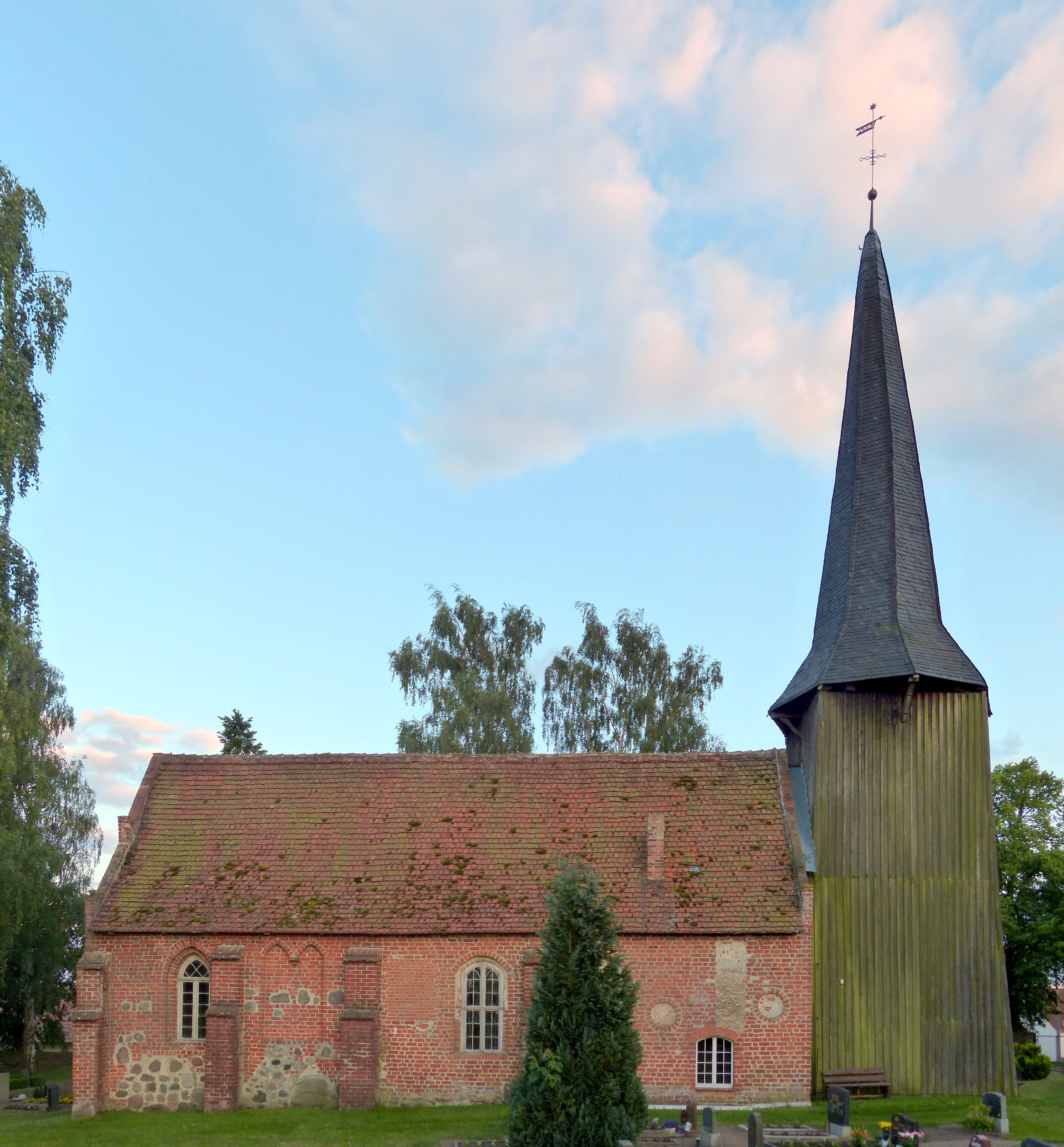 Kirche in Weltzin, Nordseite